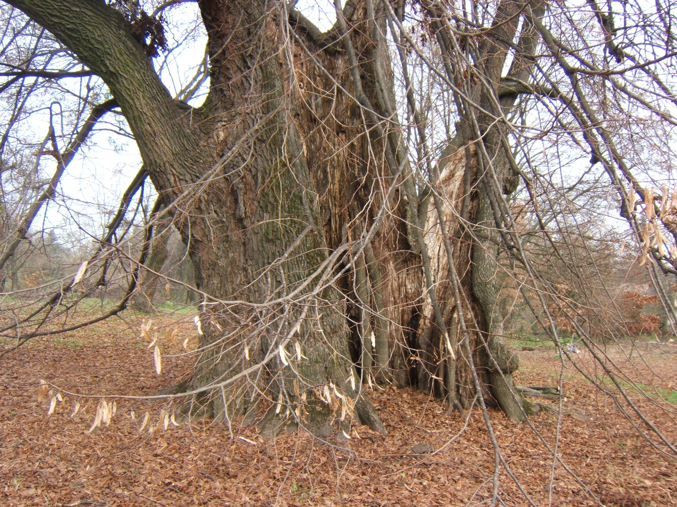 Ötvöskónyi, óriásfa